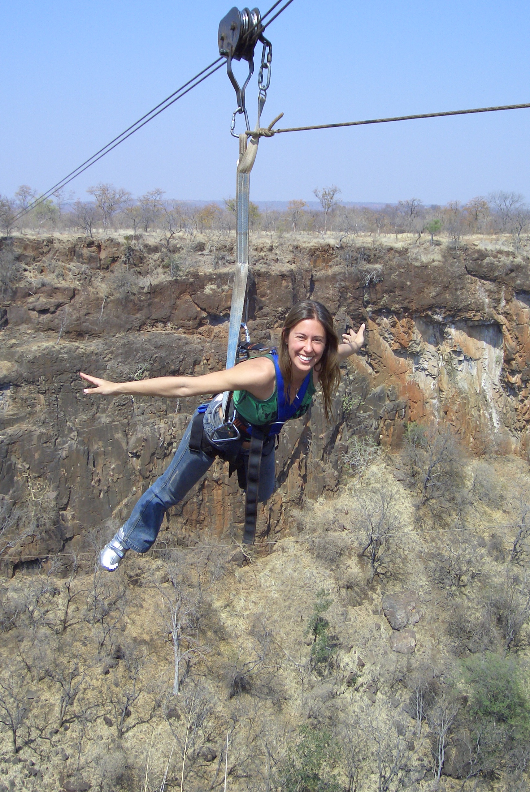 Dani Bungee Jump